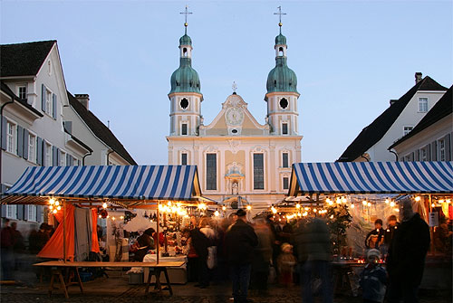 Adventsmarkt in Arlesheim